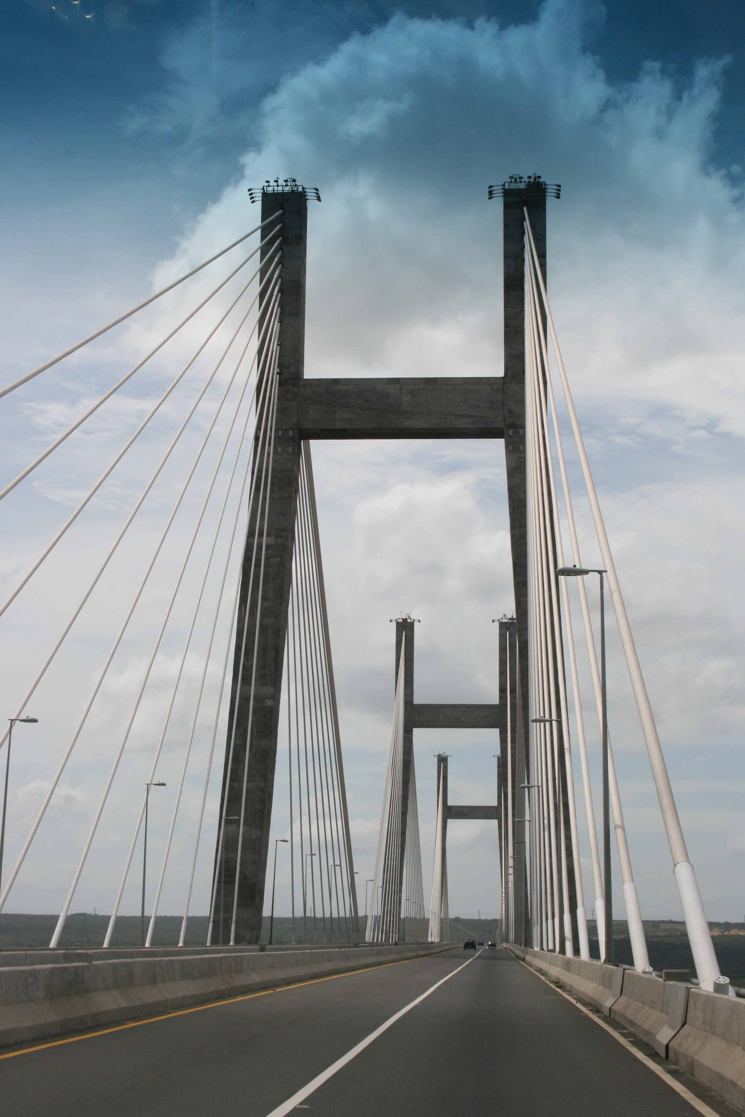 Espectacular Puente Orinokia